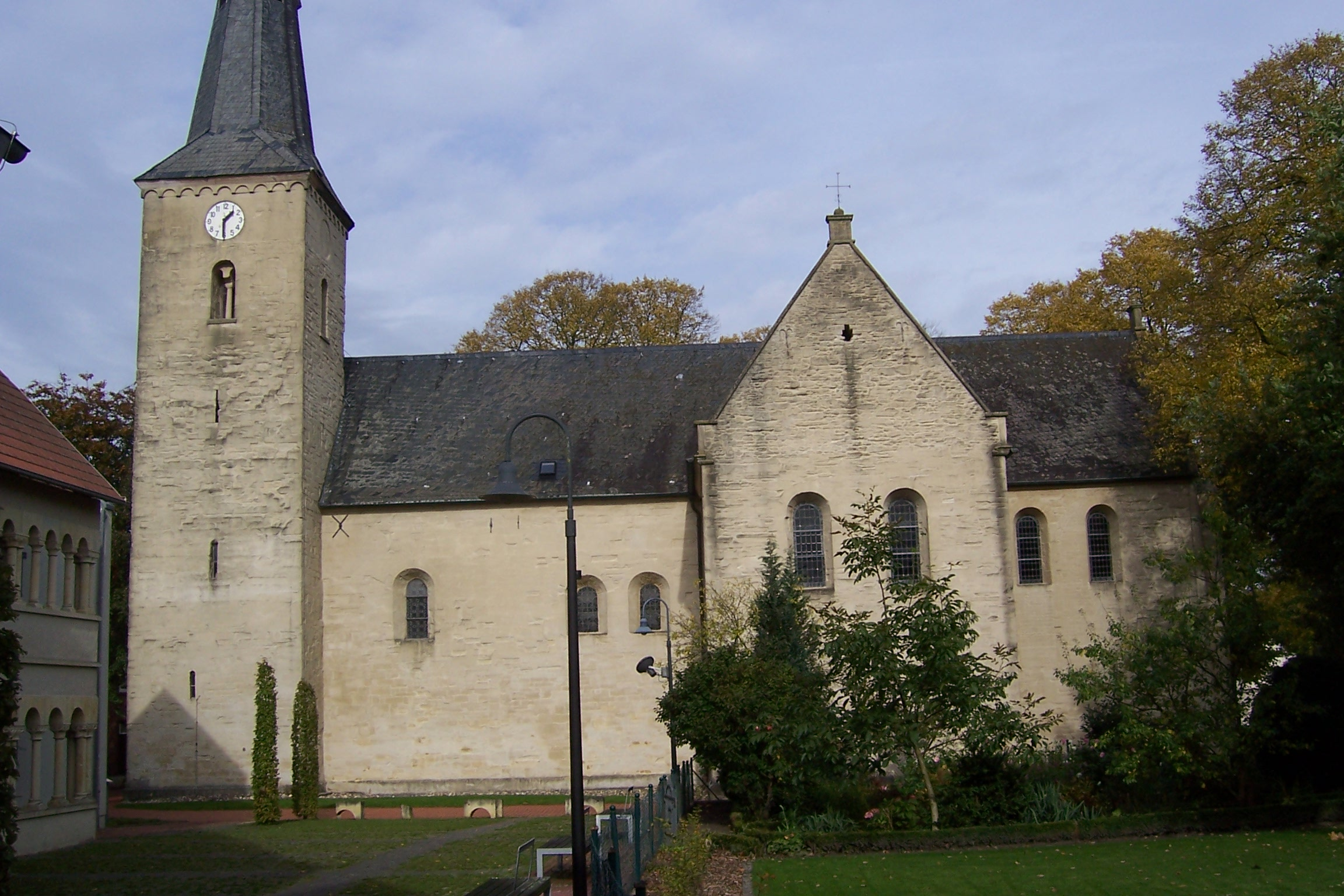 Totalansicht von Norden.